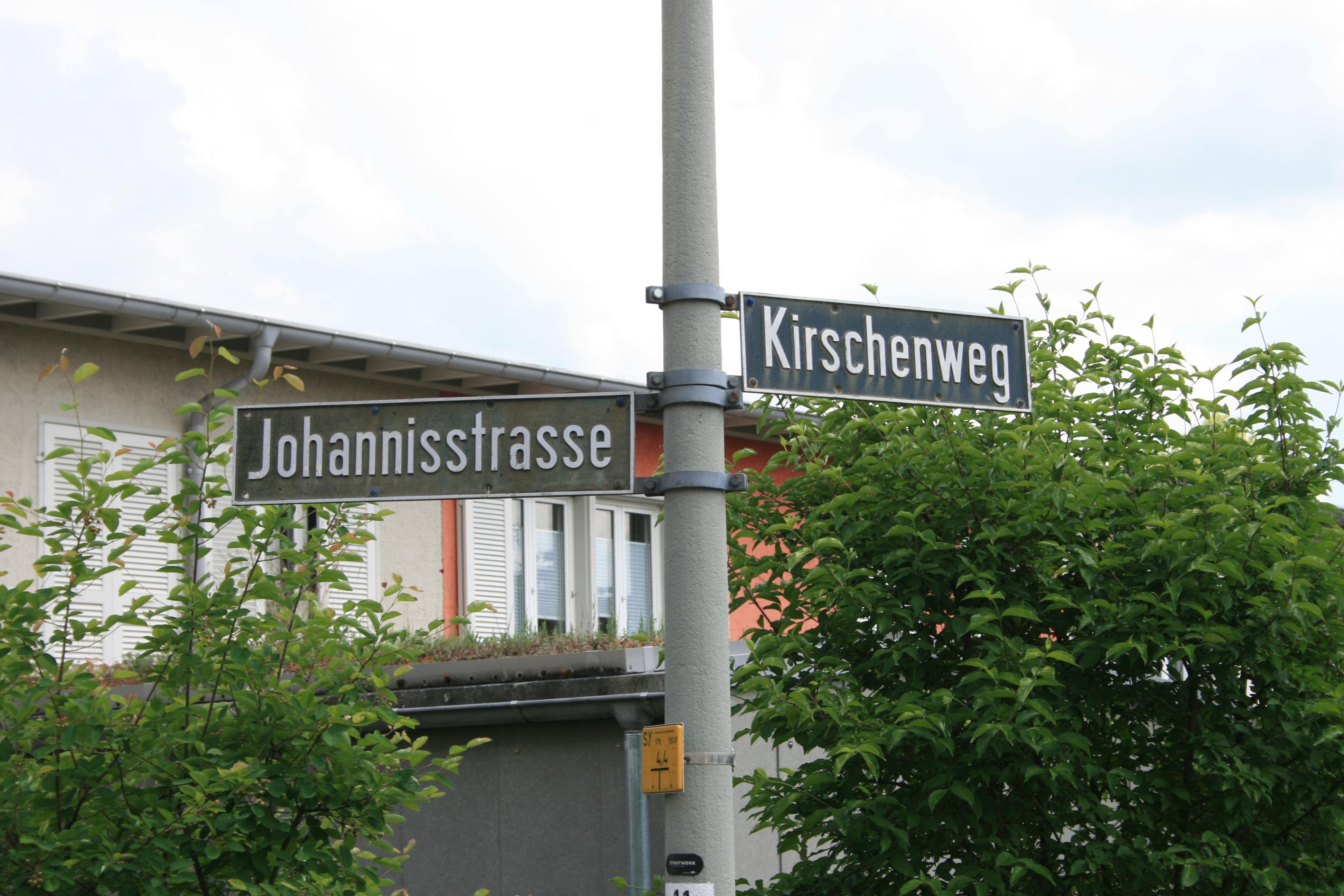 Wegweiser zweier Strassen in der Siedlung Stadtrain - Aufgrund der Strassenbenennungen wird das Quartier im Volksmund «Birchermüesliquartier» genannt.)